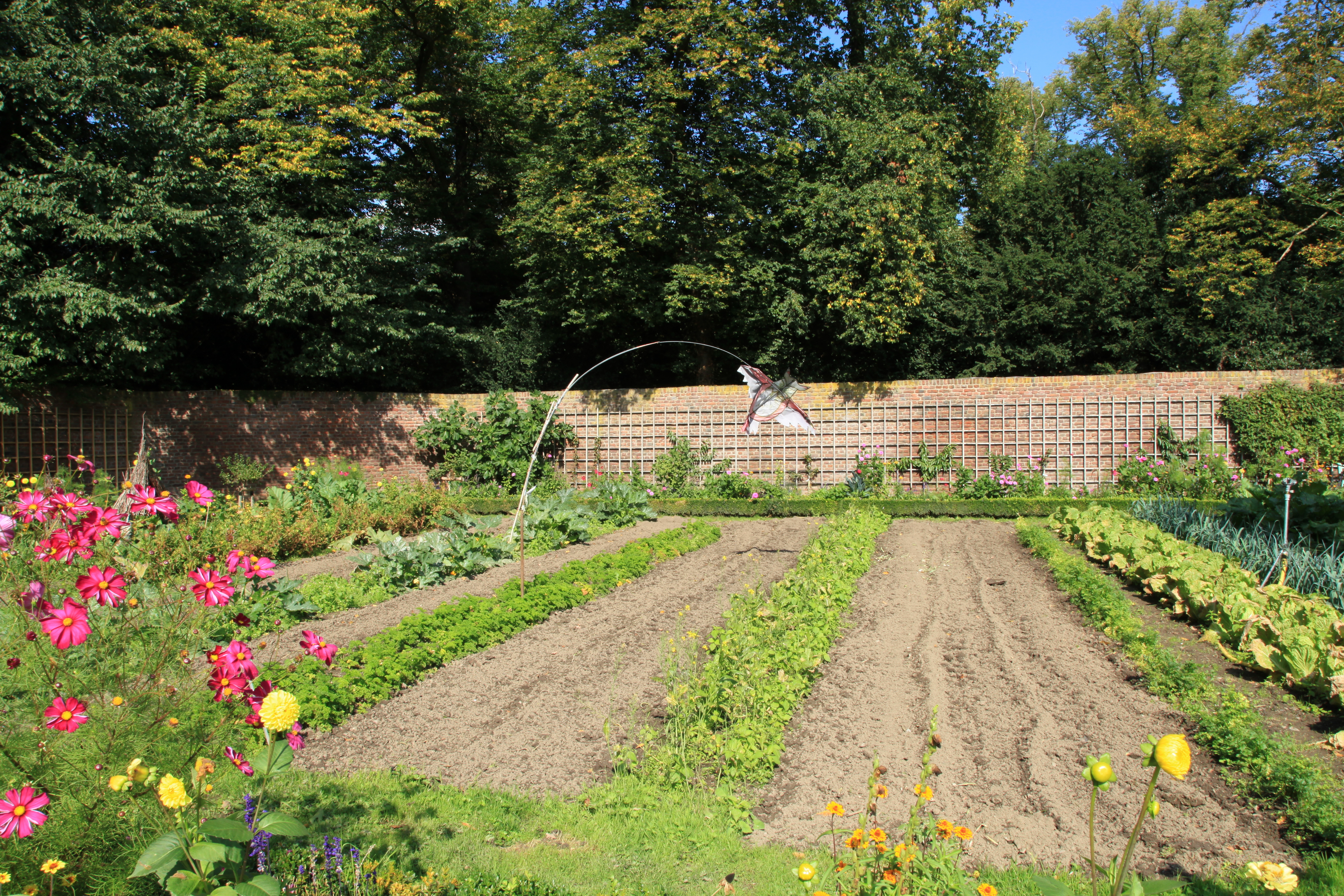 Küchengarten im Schlosspark Benrath in Düsseldorf